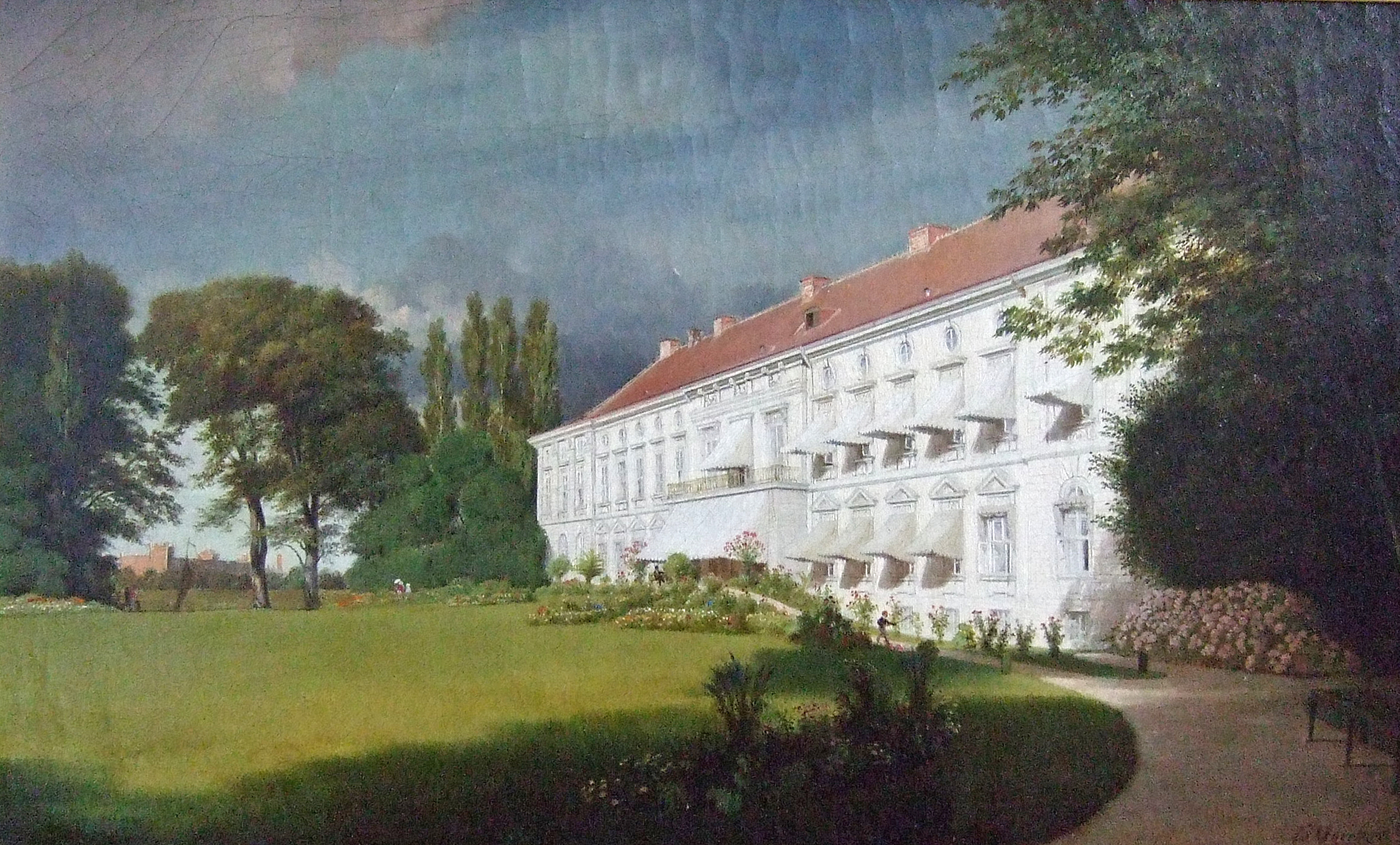 Schloss Bellevue in Berlin von der Gartenseite von Eduard Gaertner, 1847 -- ausgestellt in Schloss Friedrichsfelde (Standort des Stadtmuseums Berlin)